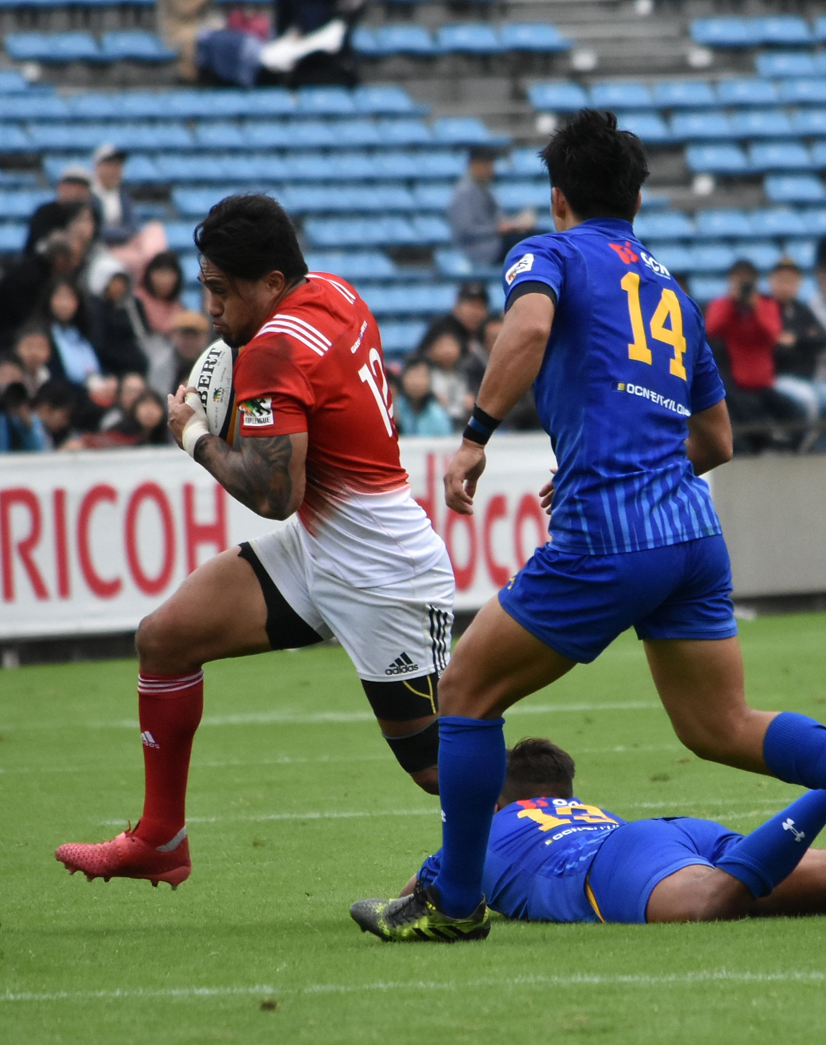 マレ・サウ